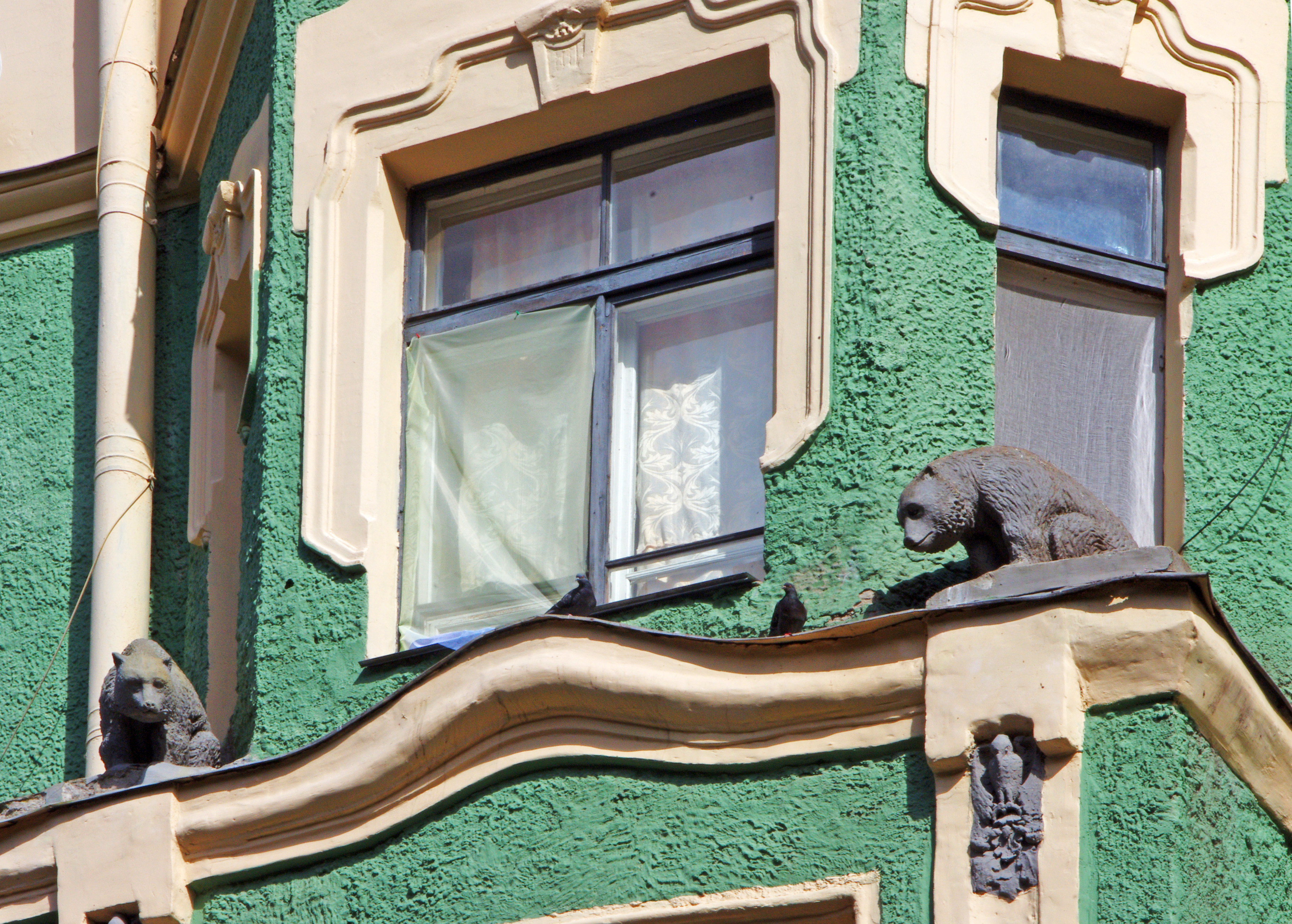 Vyborg, Leningrad Oblast, Russia